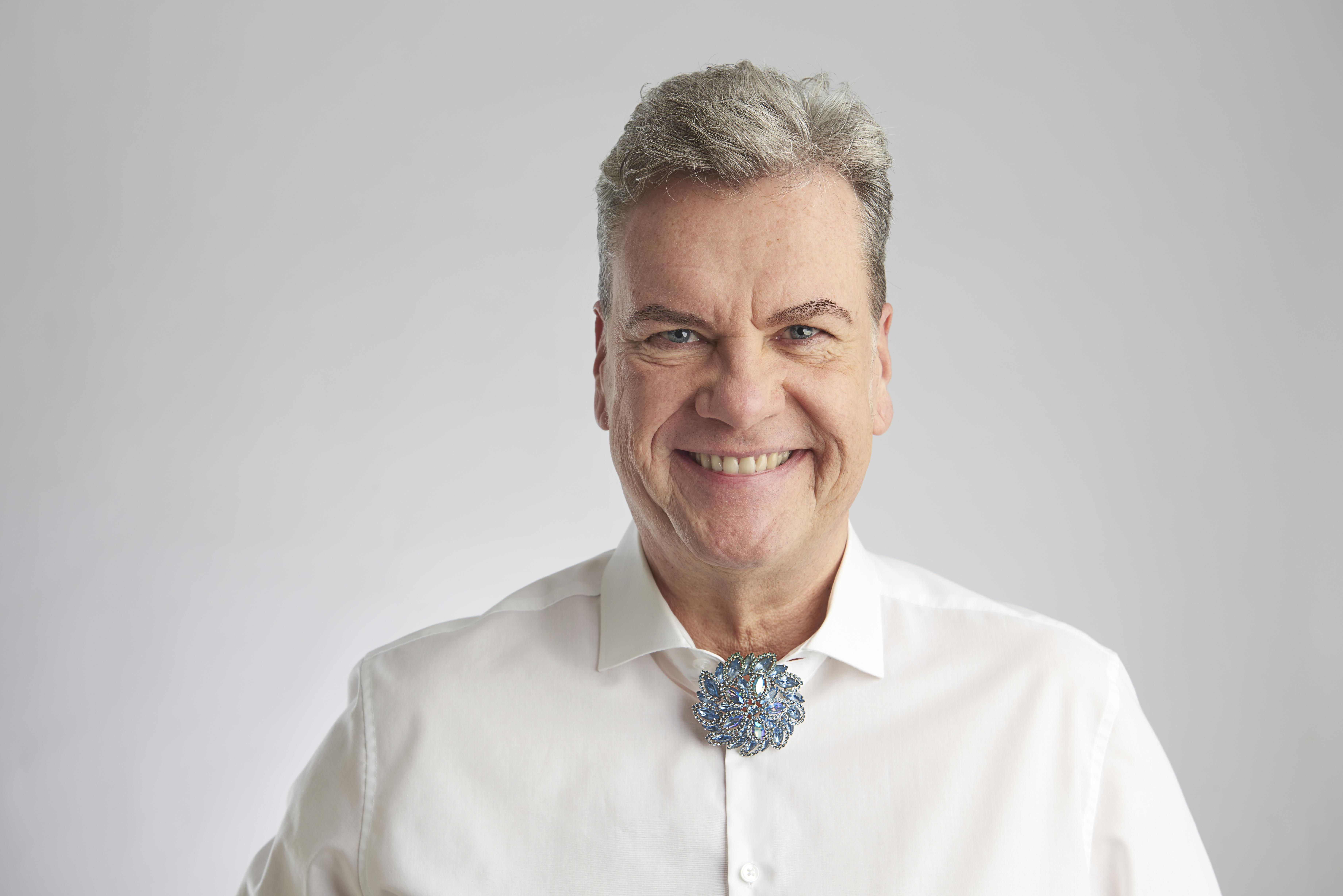 Portrait des Düsseldorfer Kabarettisten Manes Meckenstock